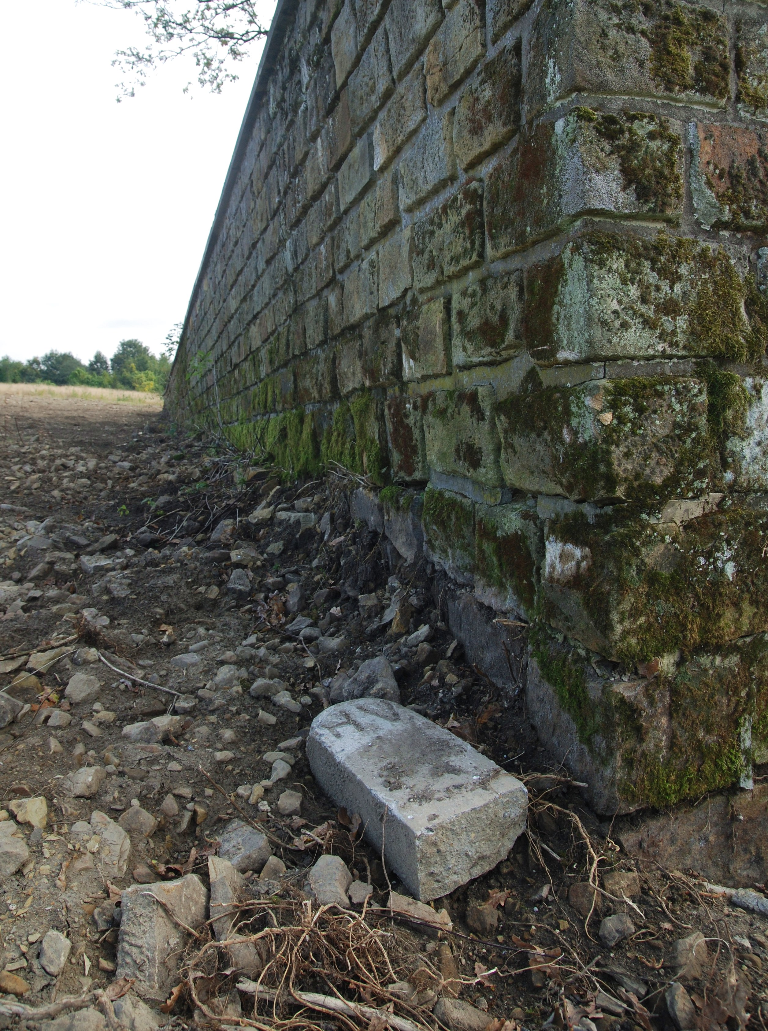 wieś Ropica Górna